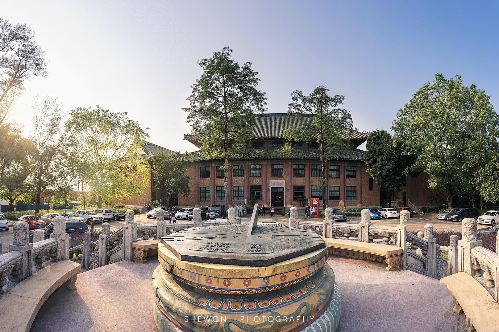 华南理工大学五山校区日晷台及12号楼（原国立中山大学法学院）